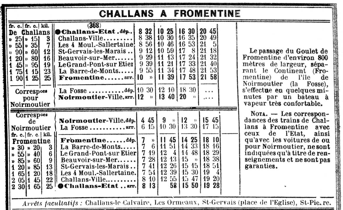 Livret horaire de la ligne Chalans - Fromentine